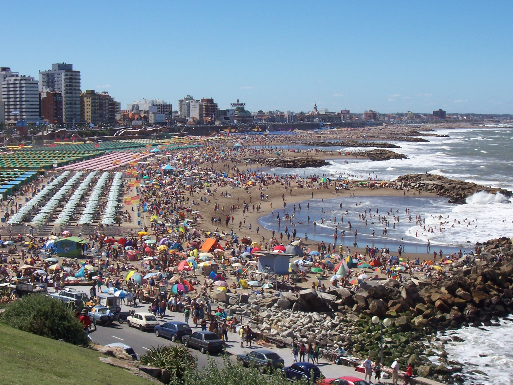 Playa La Perla, una de las principales playas de Mar del Plata, en plena temporada estival.